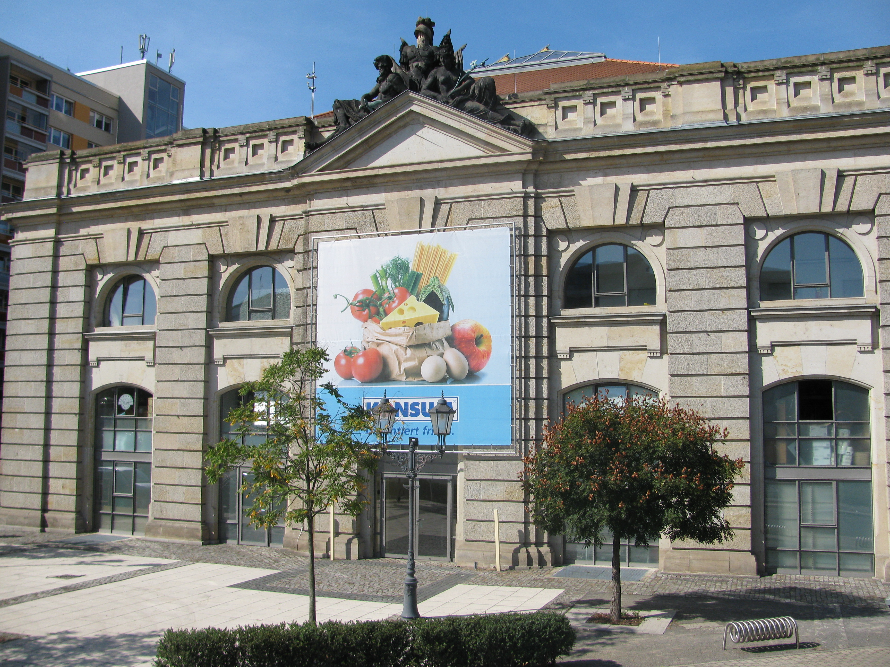 Neustädter Markthalle, Innere Neustadt, Dresden. Blick auf die südöstliche Fassade an der Albertstraße